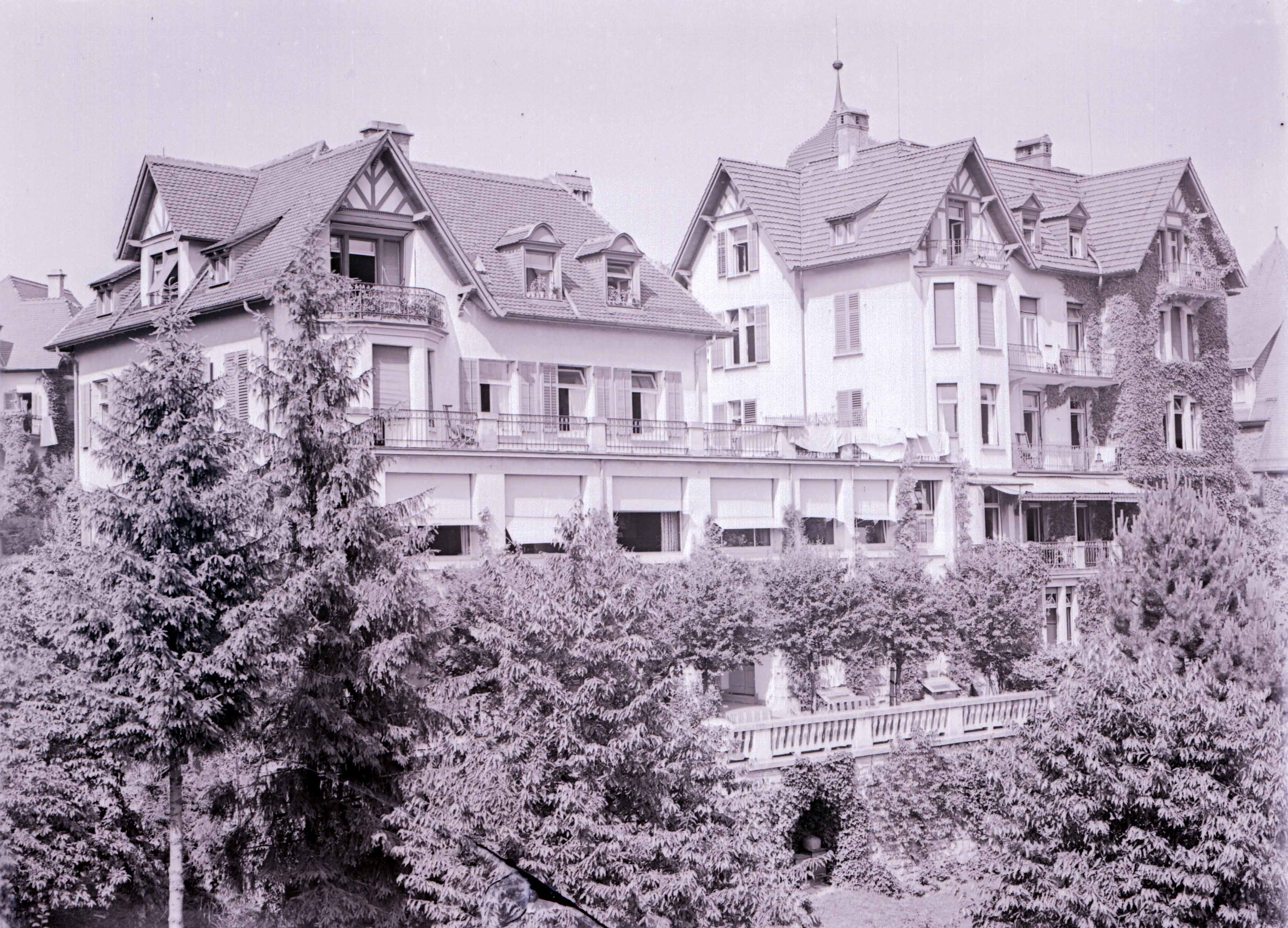 Sanatorium "Lebendige Kraft", undatiertes Foto (wahrscheinlich 1920er Jahre) - Maximilian Bircher Benner